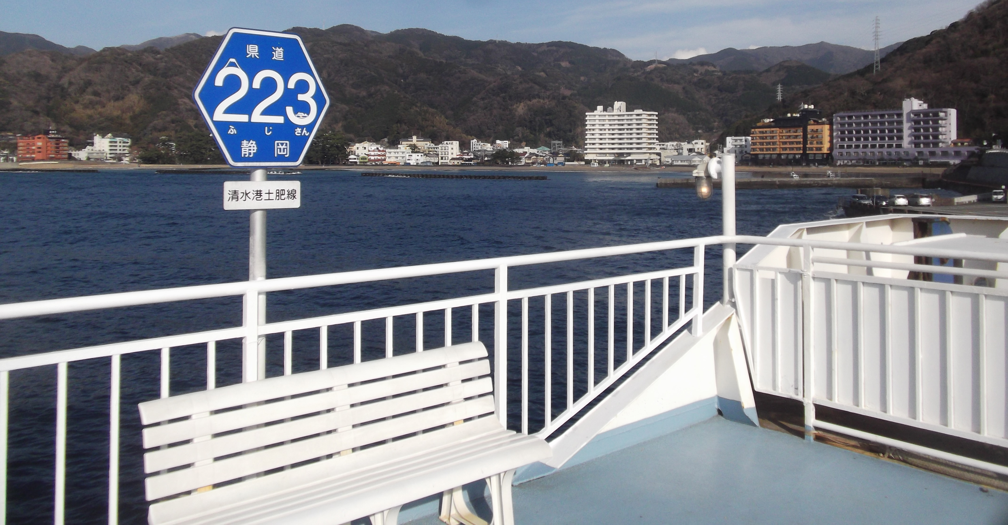 静岡県道223号清水港土肥線の標識。清水港から土肥までが指定されている。県道の標識は海上の代わりに、港とフェリーの甲板に設置されている。